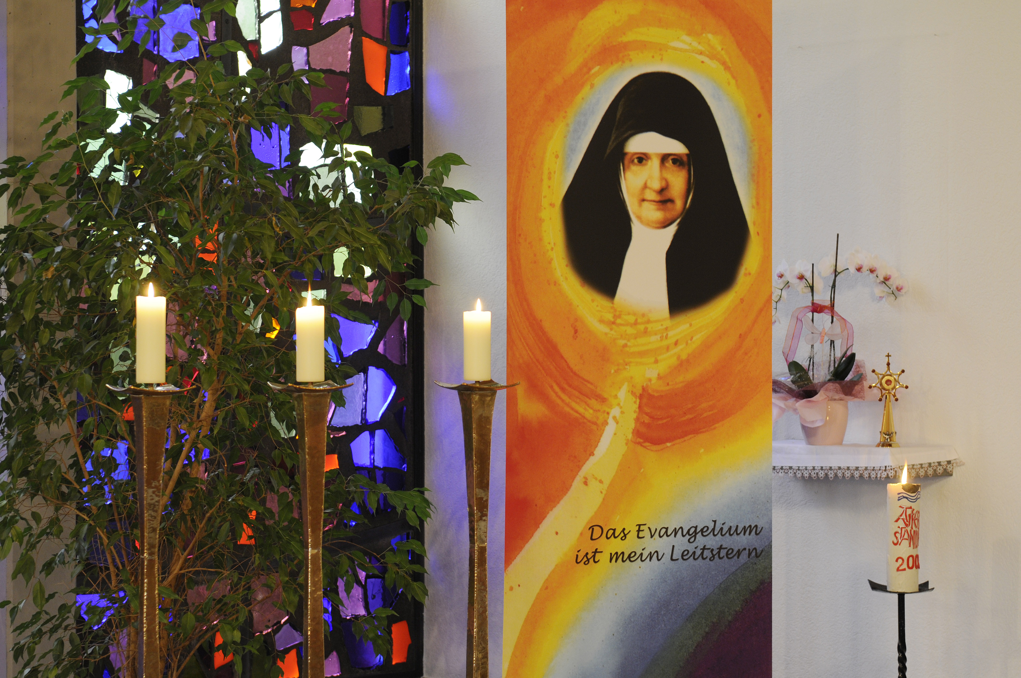 Präsenz der Heiligen Maria Bernarda Bütler in der Kapelle des Bernardaheimes (Provinzialat der Franziskaner-Missionsschwestern Schweiz/Österreich)